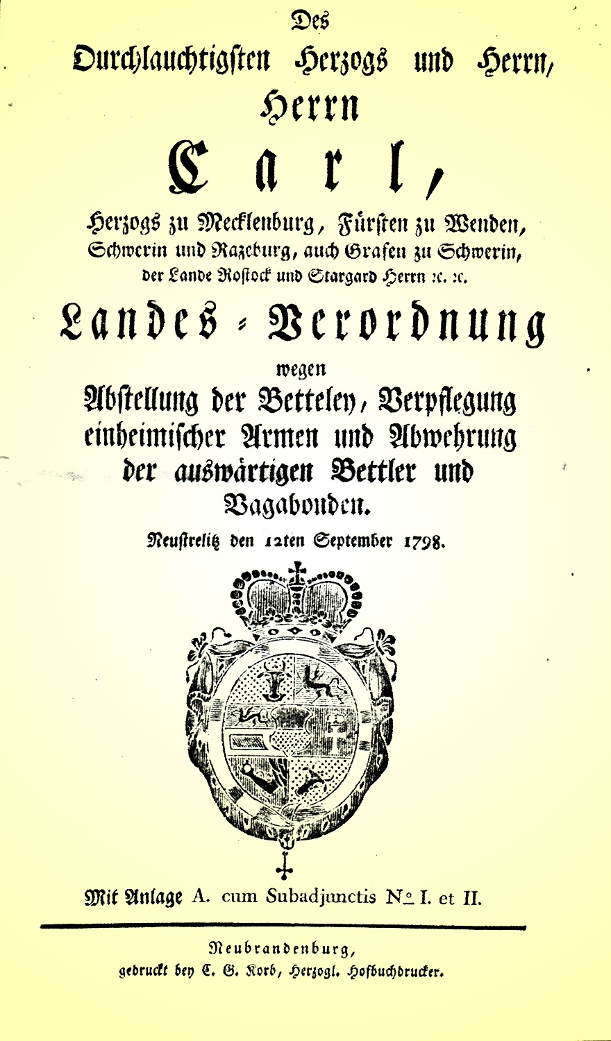 Landesverordnung vom 12. September 1798